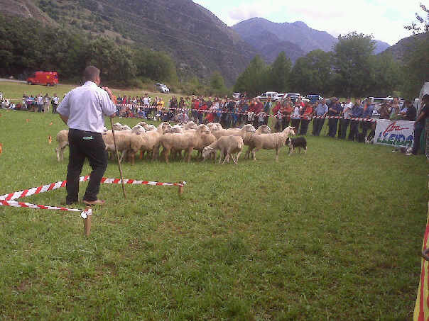 Concurs de gossos d'atura a Llavorsí. Sempre es cel.lebra el penúltim diumenge d'agost